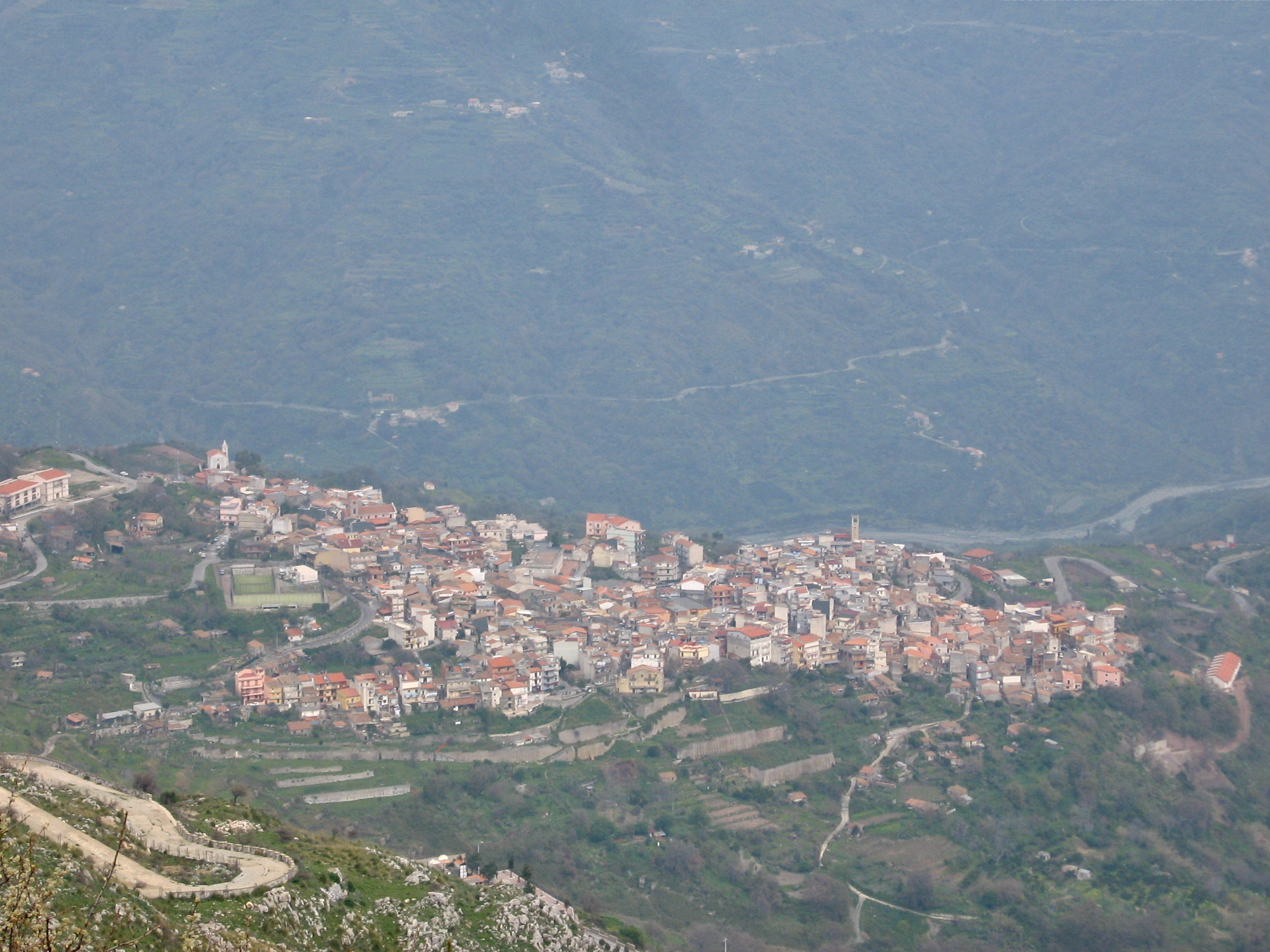 Vista di Limina dal Monte Kalfa